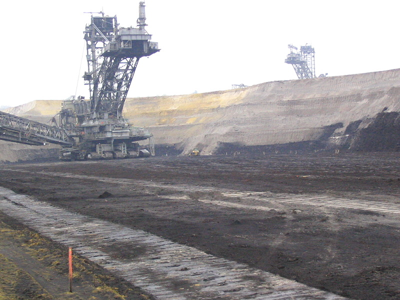 Schaufelradbagger im Tagebau Inden. Gut zu sehen die verschiedenen Abraumschichten und das Kohleflötz am Grund. Man beachte den „kleinen“ Caterpillar-Bulldozer rechts vom Schaufelradbagger zum Größenvergleich.